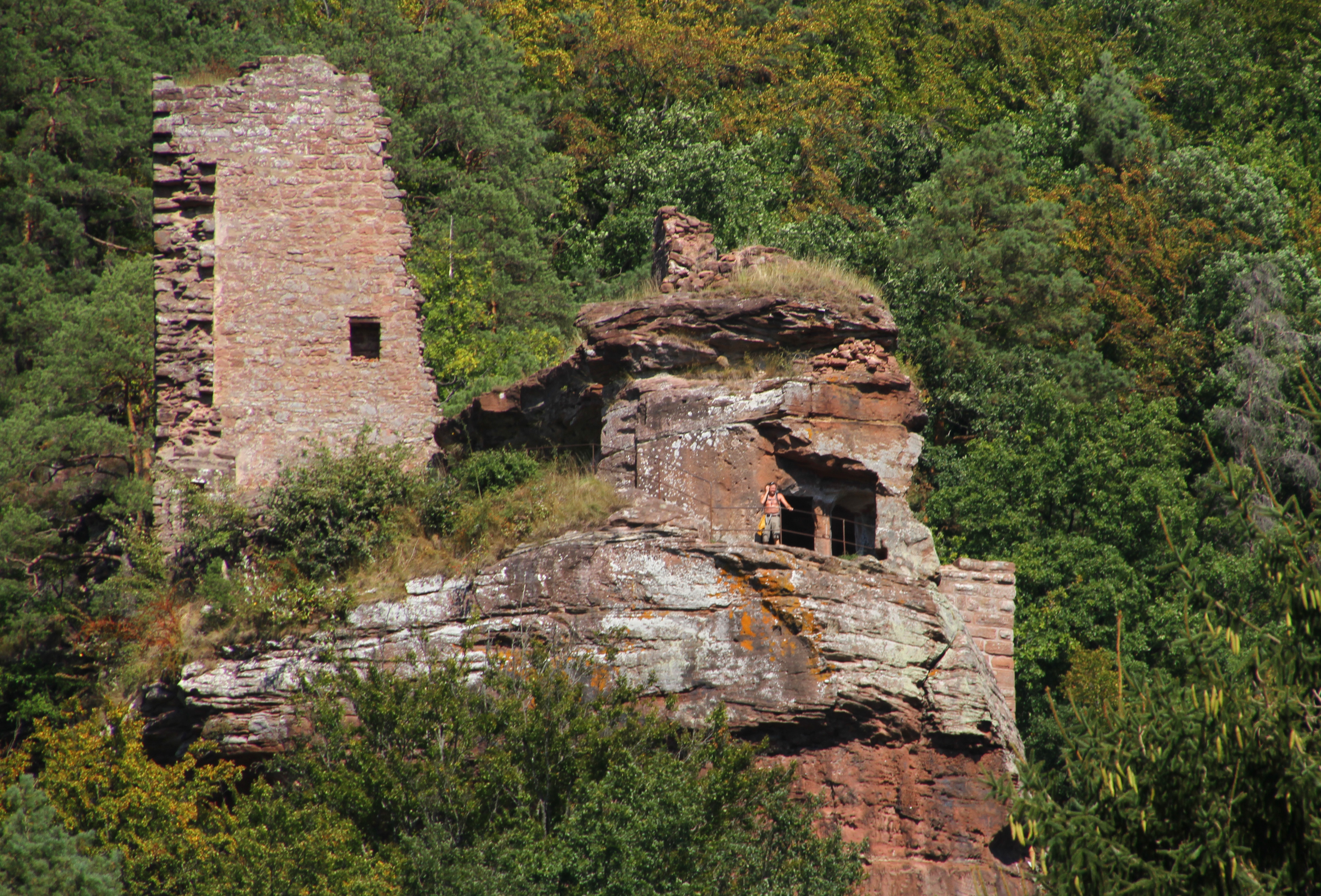 Obersteinbach